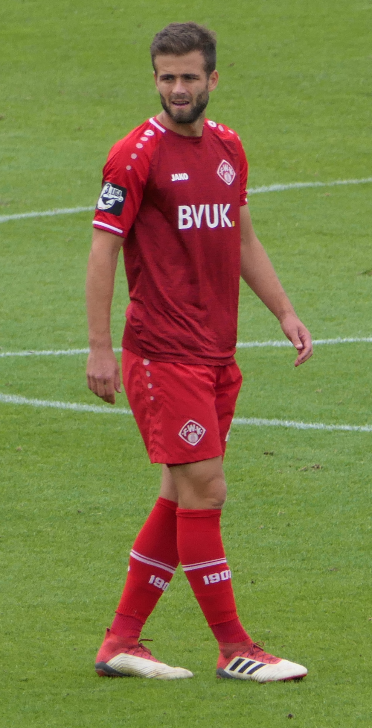 Der Fussballprofi Daniel Hägele im Trikot der Würzburger Kickers beim Heimspiel gegen Eintracht Braunschweig am 22.09.2018.